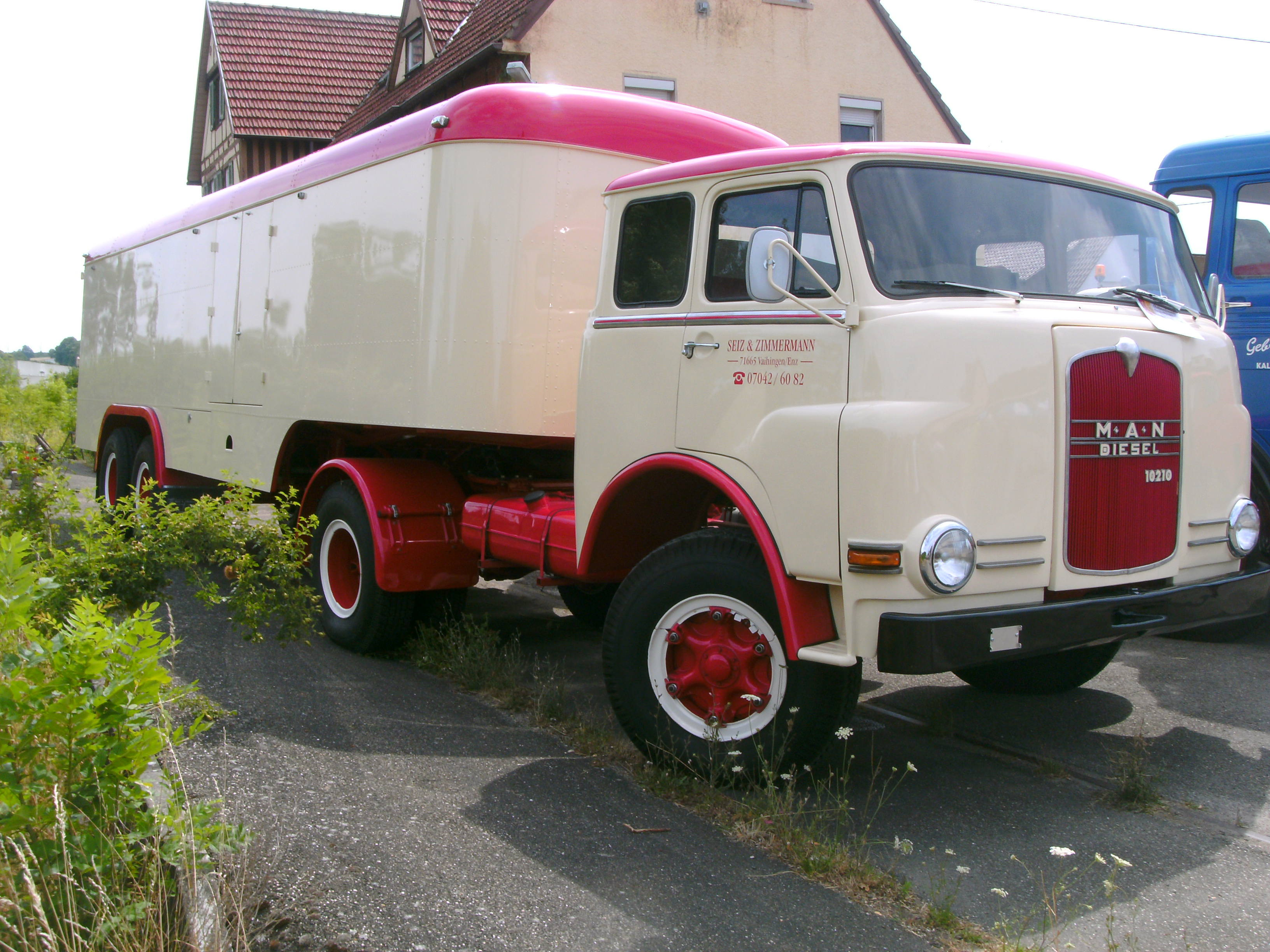 MAN 10.210, Baujahr 1962, 210 PS